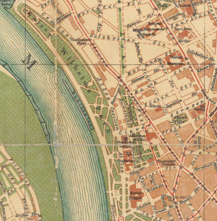 Stadtplan von Düsseldorf Ausschnitt Kaiser-Wilhelm-Park (Rheinpark Golzheim), Golzheimer Friedhof, 1909